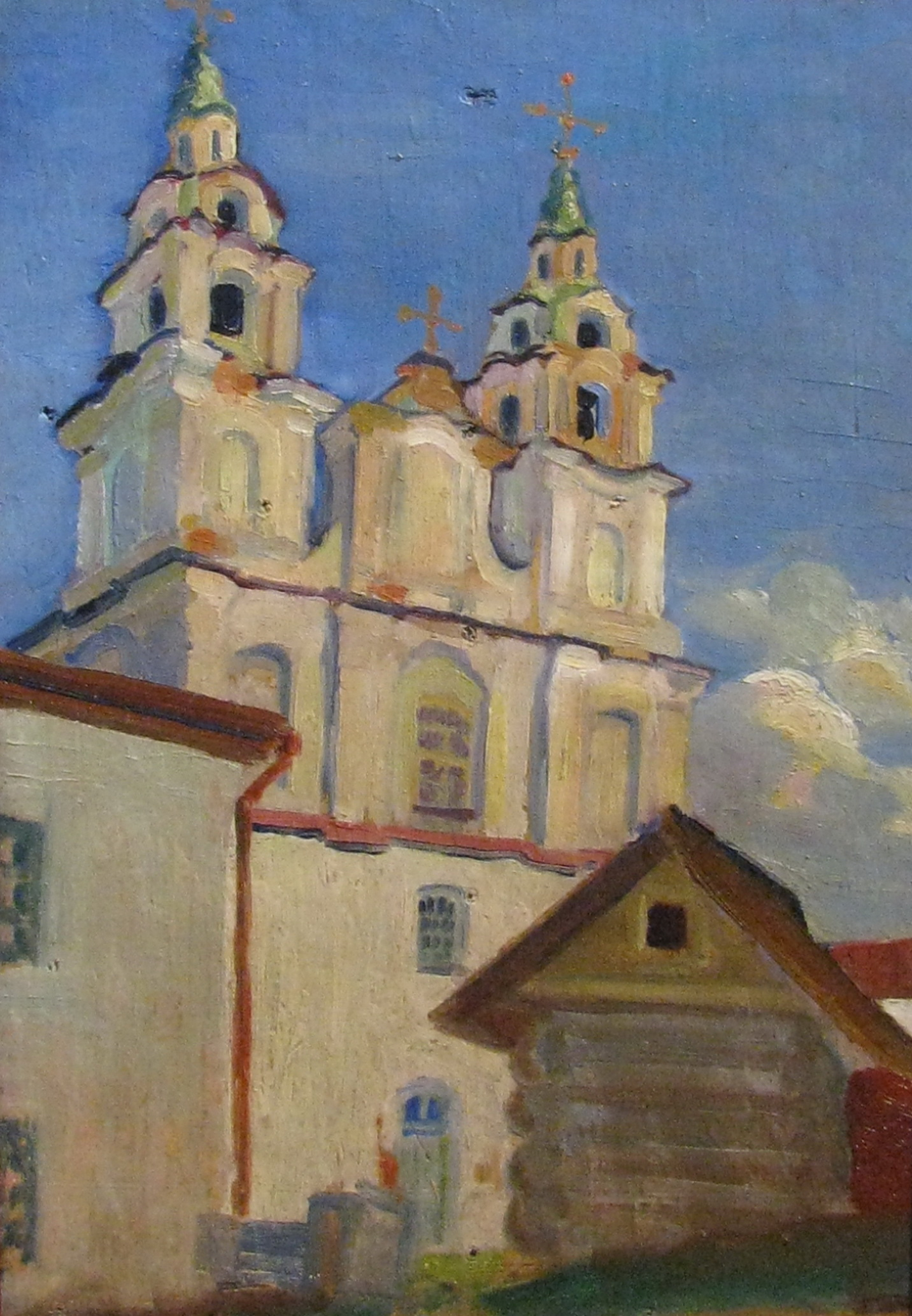 Міхаіл Філіповіч. Мінск. Духаў манастыр. Фанера, алей